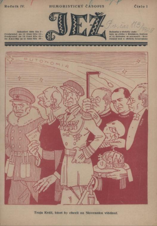 Titulný list humoristického časopisu Jež.